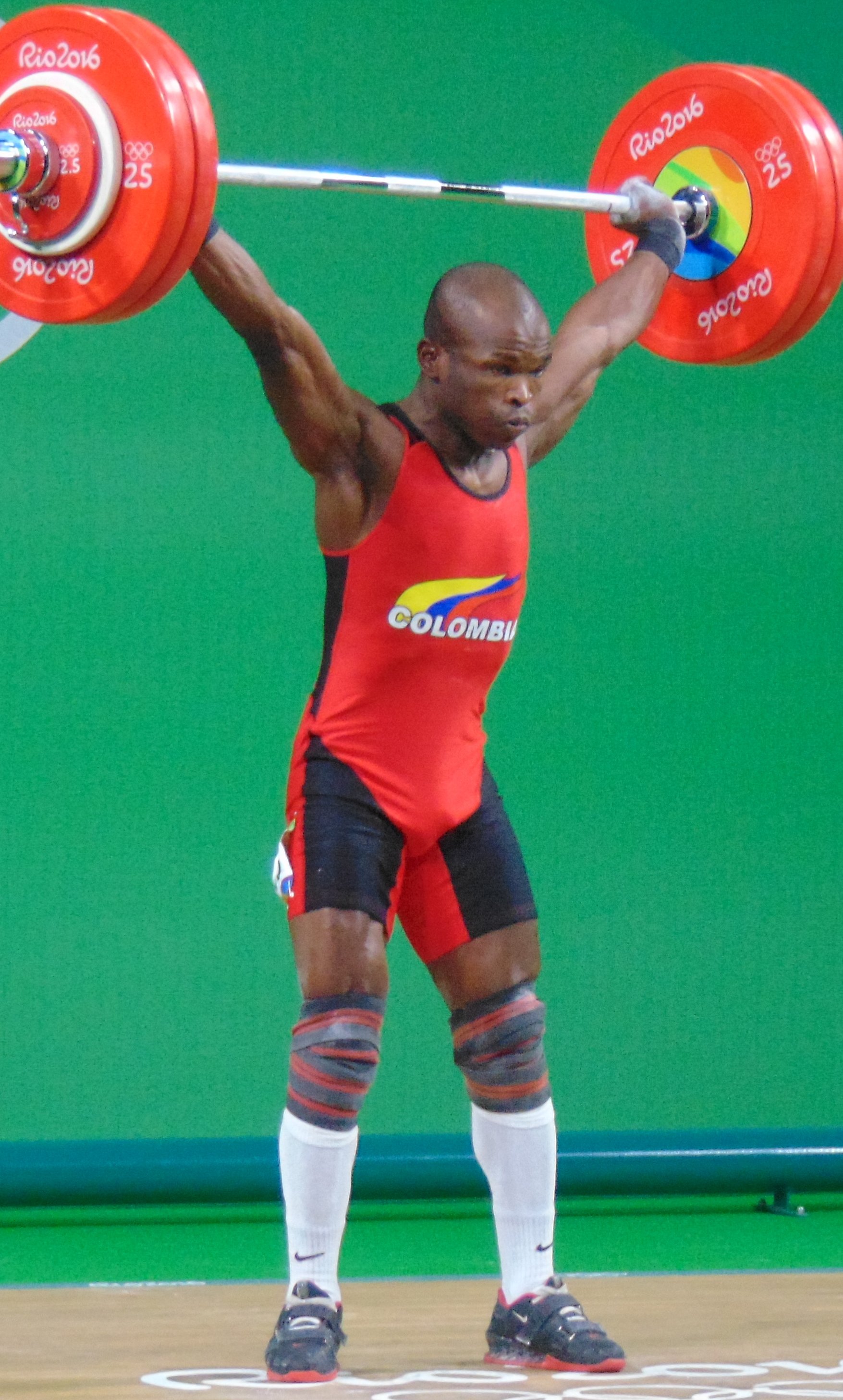 Rio 2016 - Weightlifting men's 69 kg